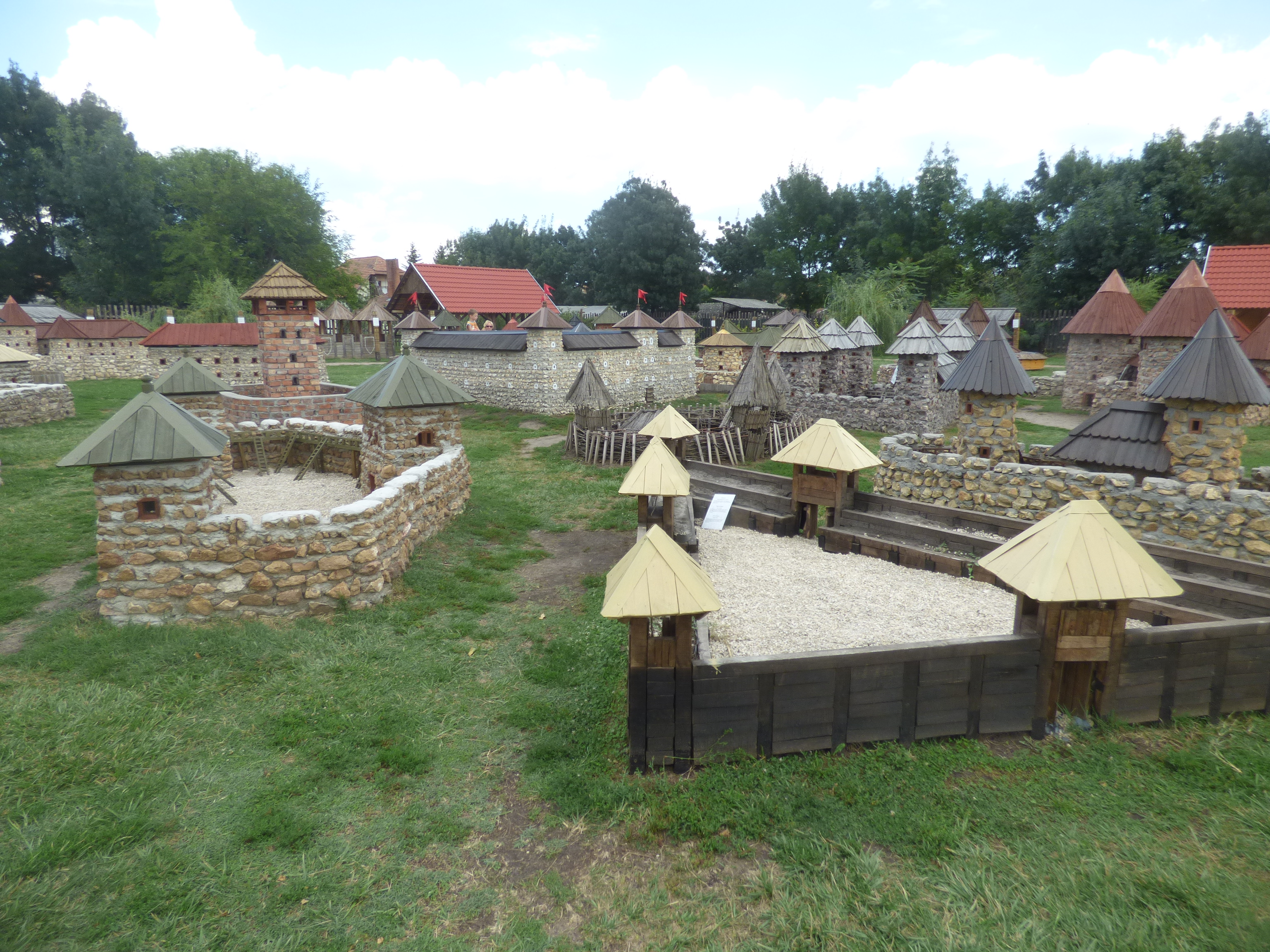 Vármakettek a dinnyési Várparkban, elöl jobbra a szabolcsi földvár makettje